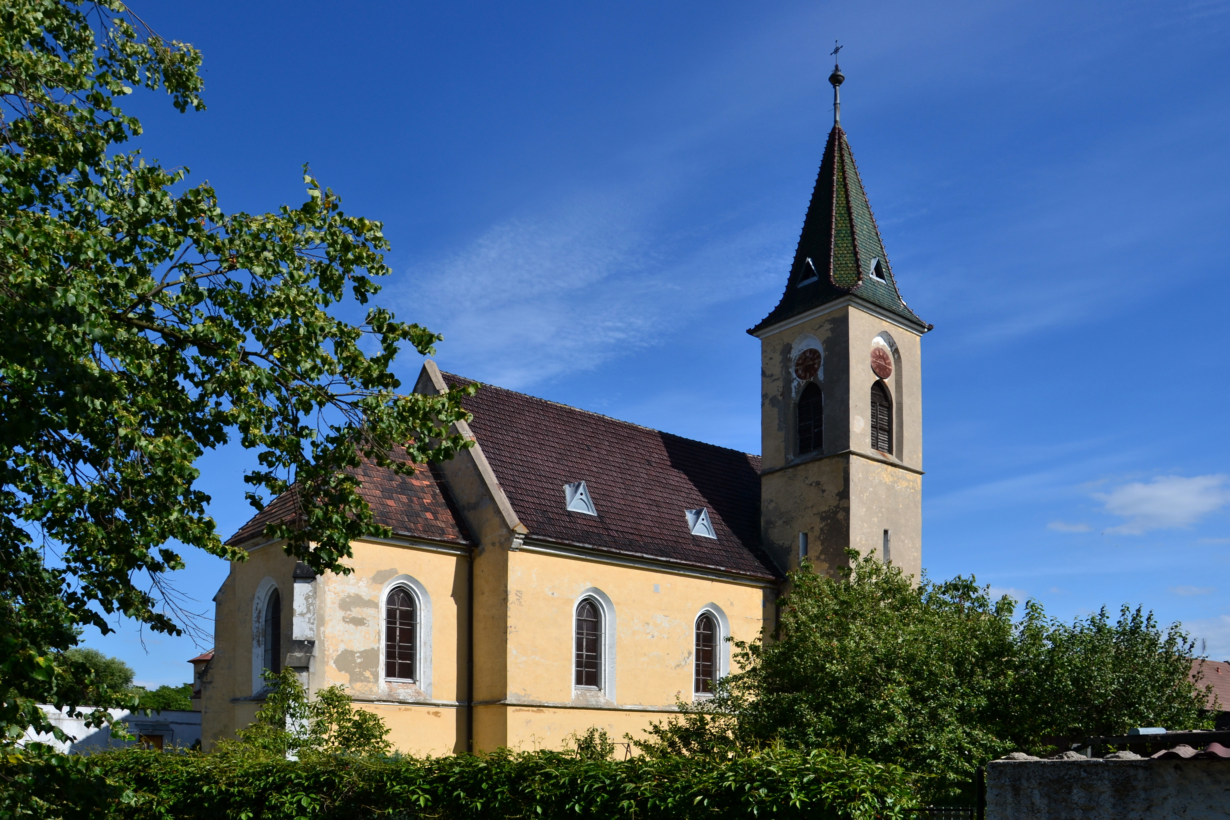 Otvice - kostel svaté Barbory